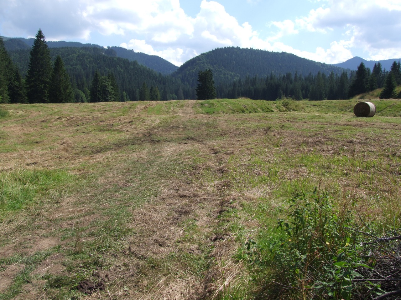 Szatanowa Polana na Cichej Dolinie Orawskiej. Ponad polaną Czaplowy Wierch (po lewej stronie) i Jeżowy Wierch